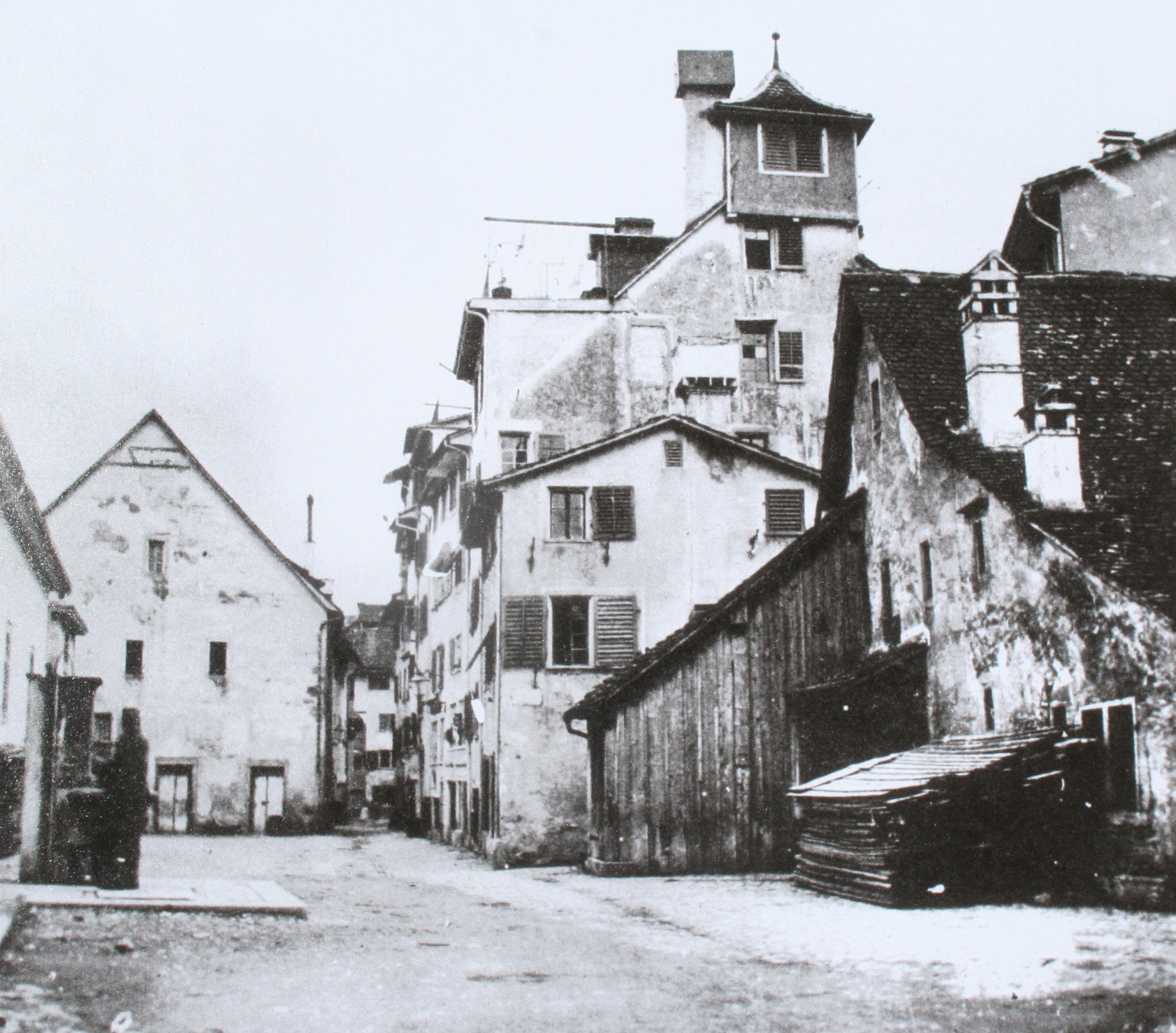 Kappelergasse im Kratzquartier 1885.